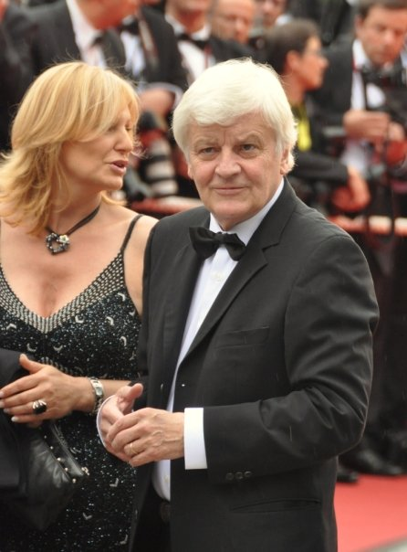 Jacques Perrin au festival de Cannes 2009